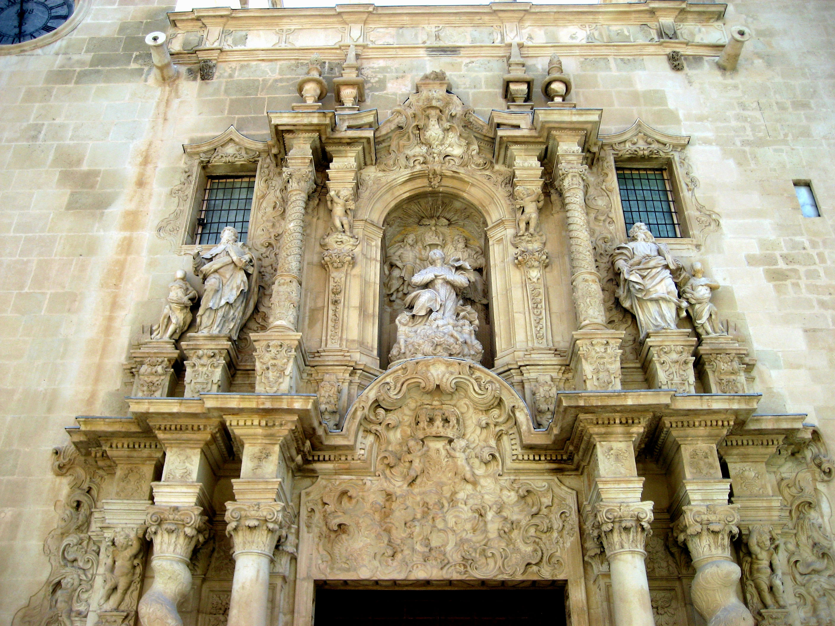 Portada principal de la basílica de Santa María de Alicante.